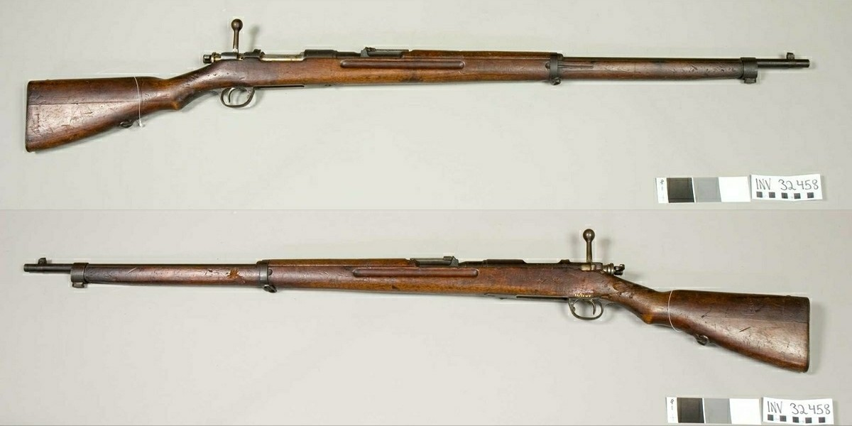 Japonska repetirka tip (model) 30, uvedena leta 1897.